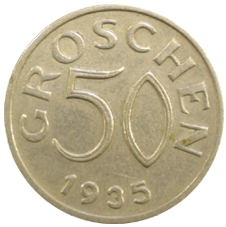 50 Groschen